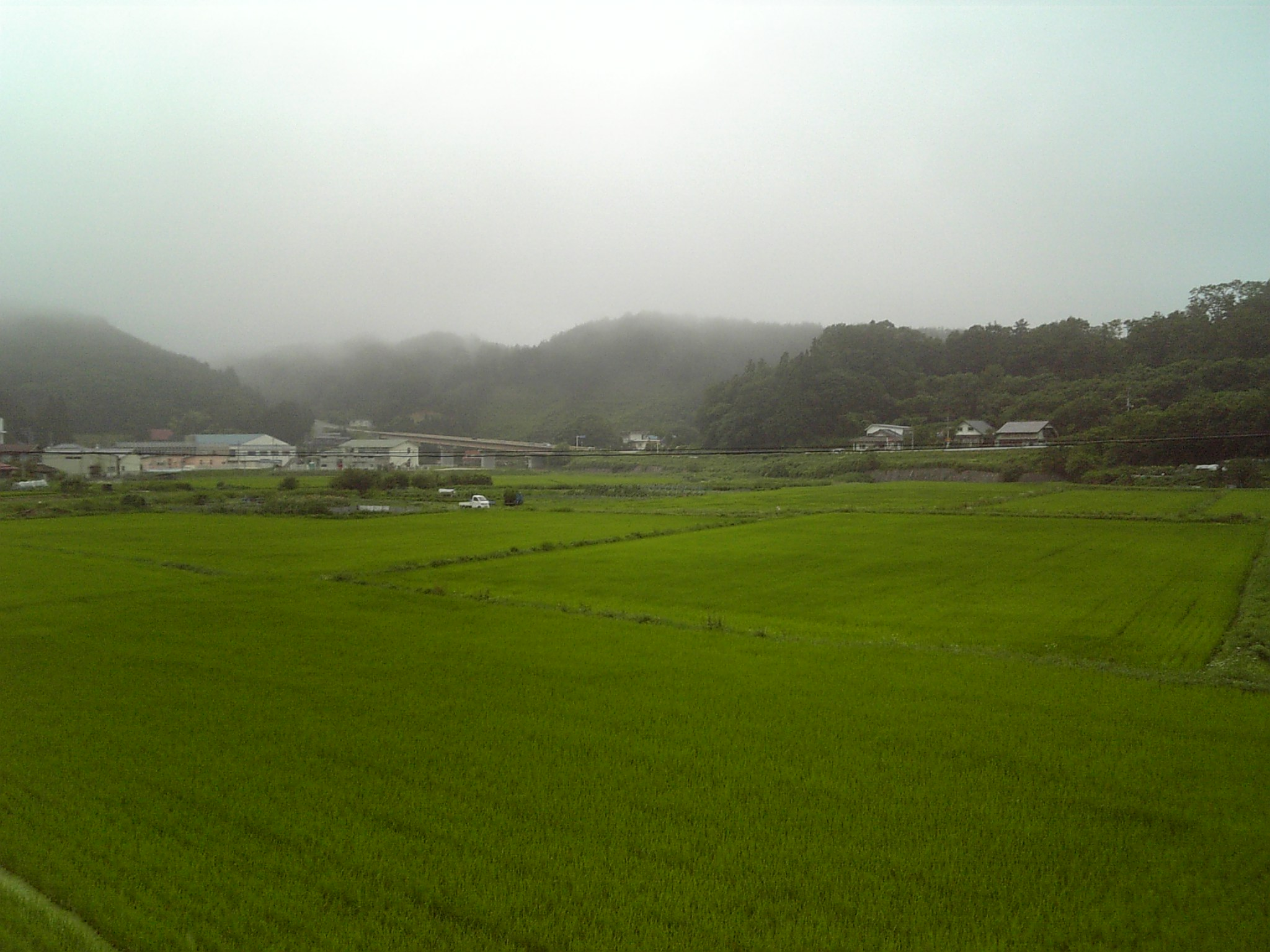 田村市都路町古道の国道288号の橋梁。国道399号から撮影。